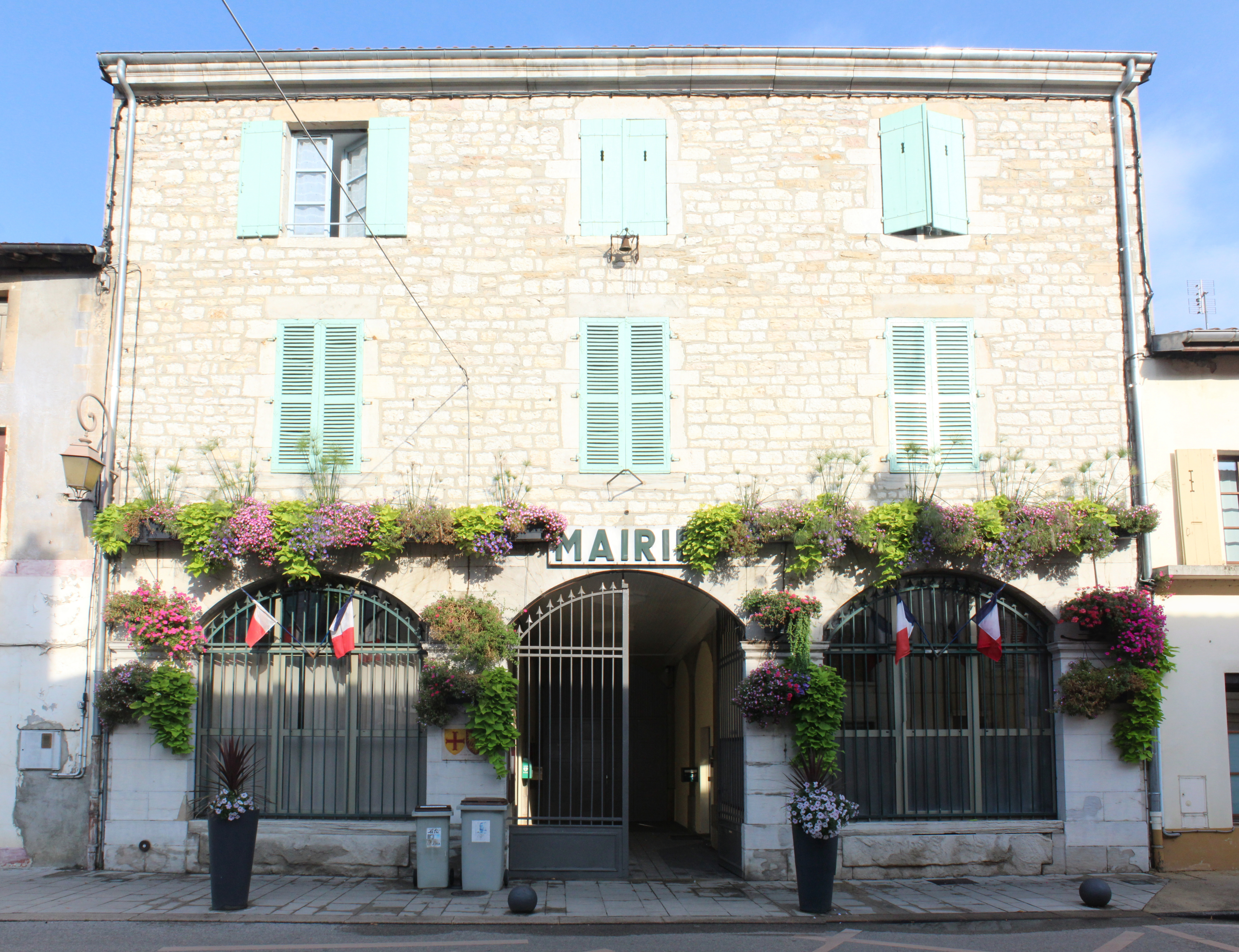 Mairie de Cousance.